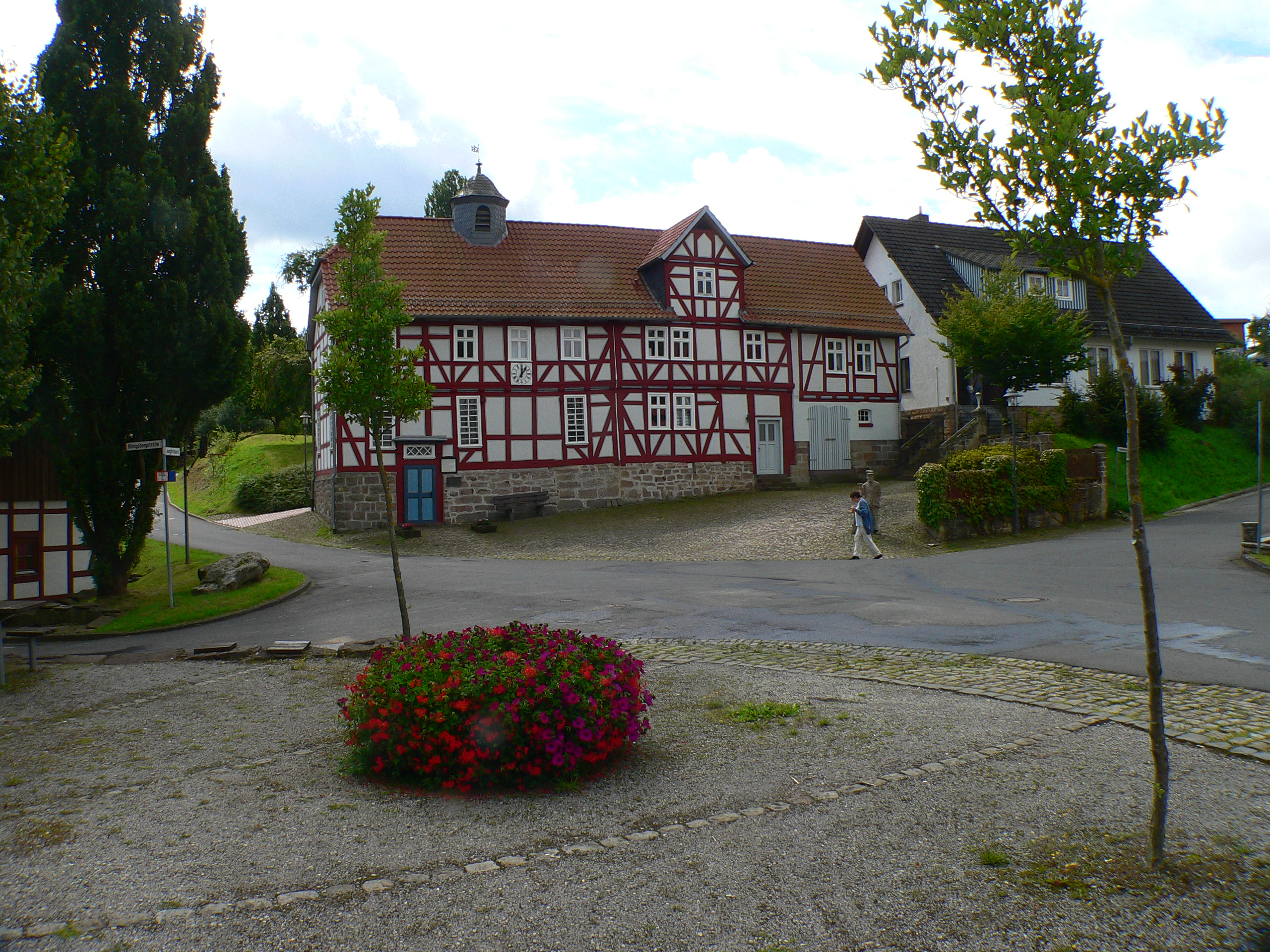 Hugenottenkirche (ev.) in Helsa (Ortsteil St. Ottilien), Hessen, Deutschland.